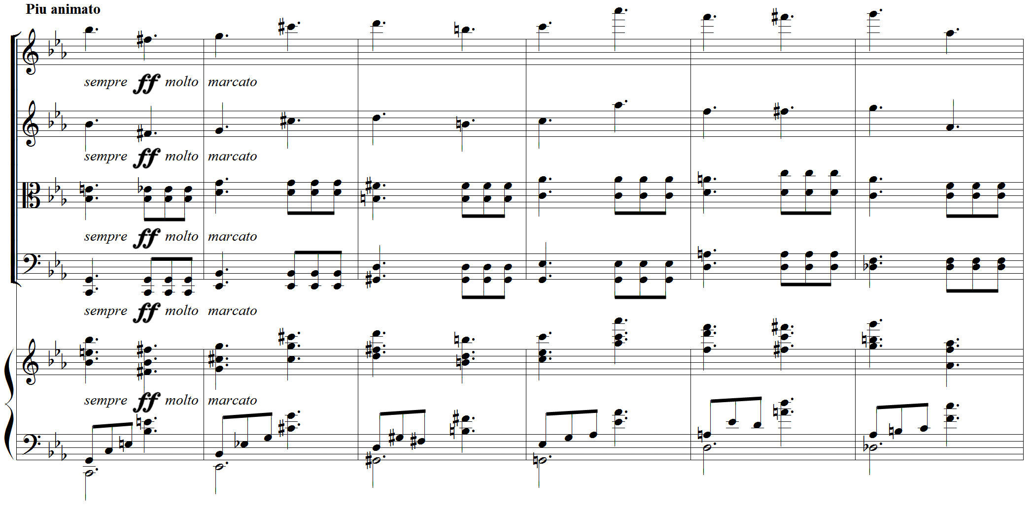 Quintette pour piano et cordes op.42 de Louis Vierne - 3ème mouvement "Piu animato"